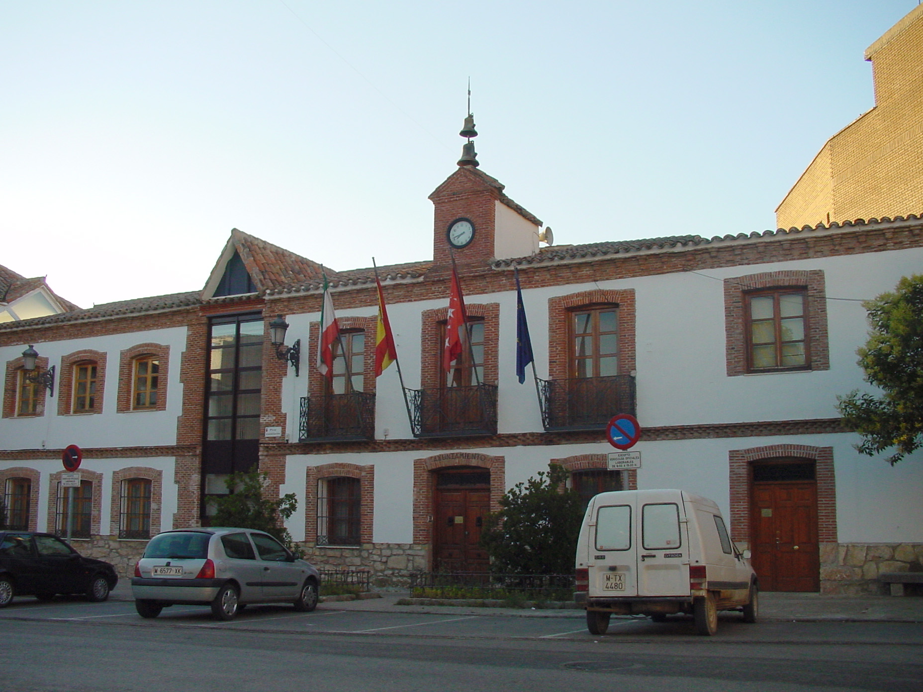 Ayuntamiento de San Agustín del Guadalix.